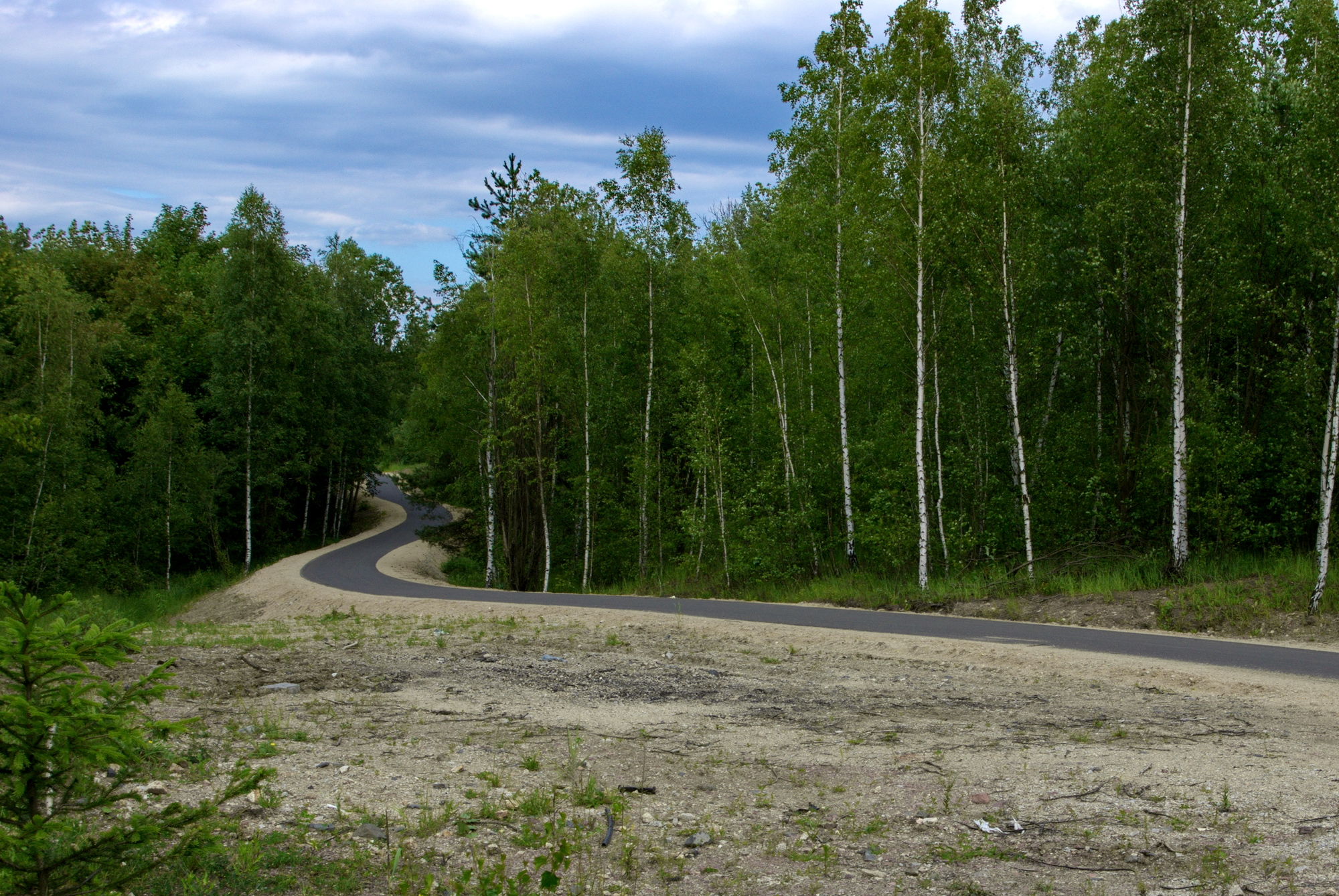 Cyklostezka č.6 - Ohře na úpatí výsypky Antonín u Sokolova